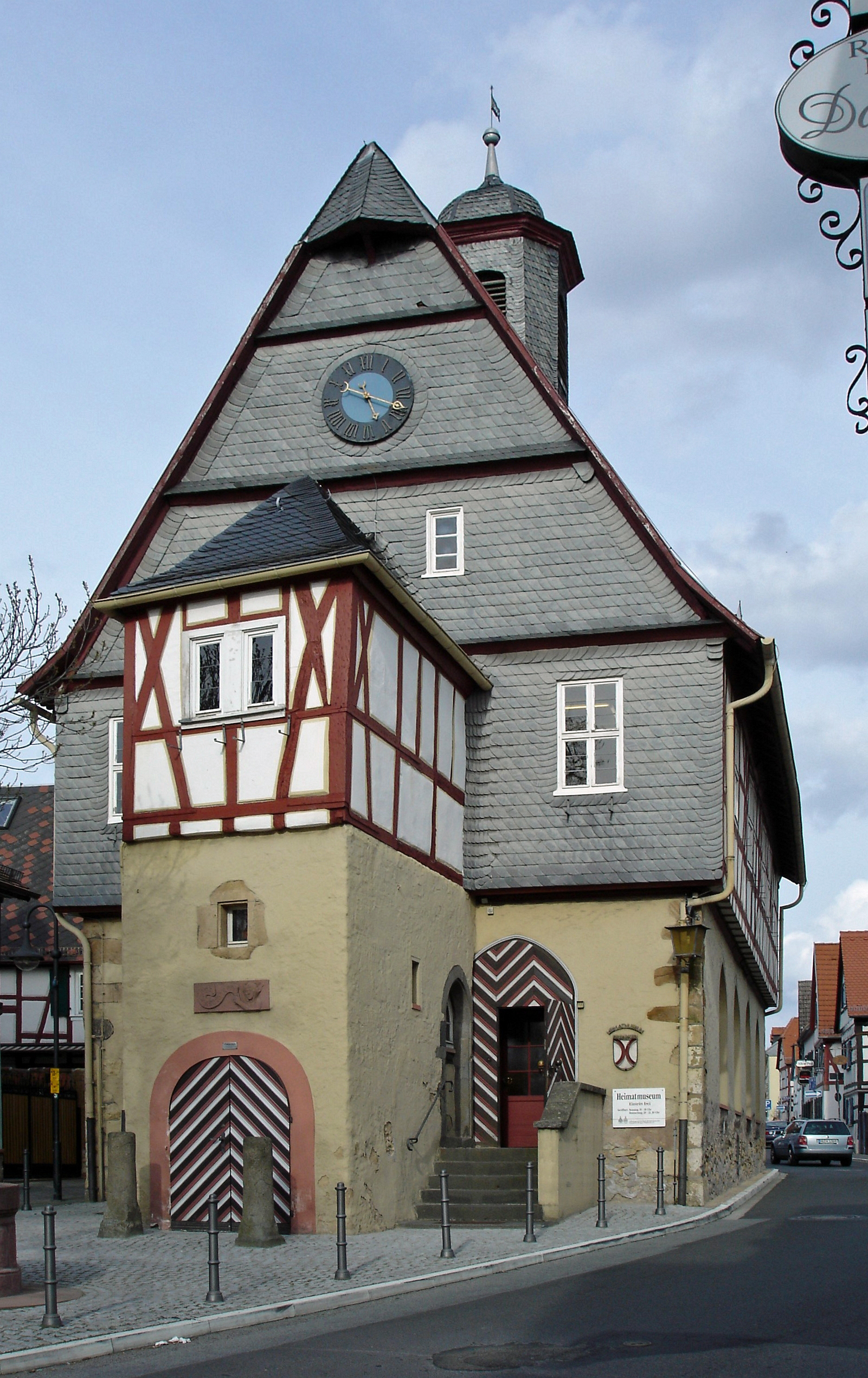 westl. Eingansseite des Heimatmuseums